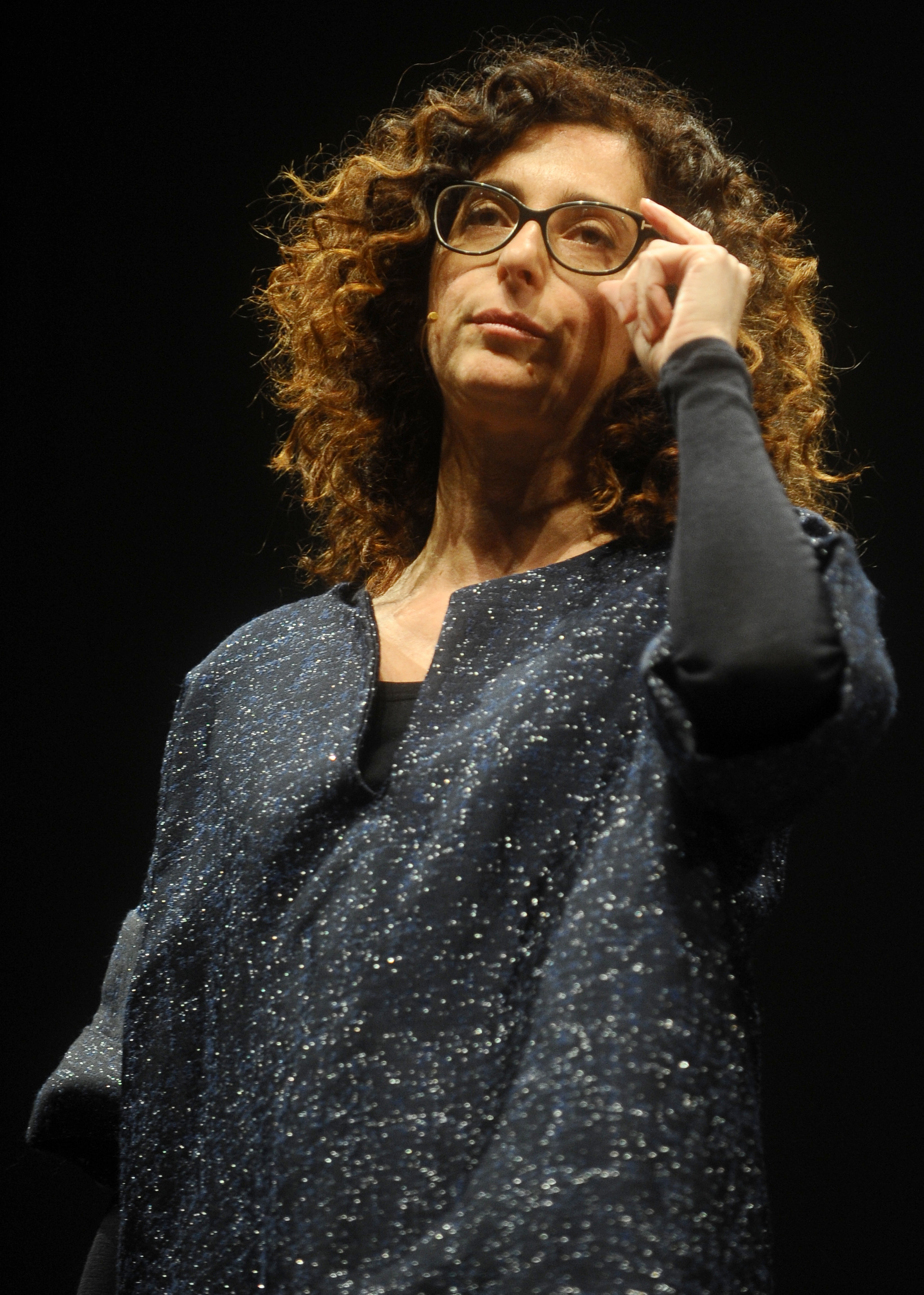 Teresa Mannino al Trento Film Festival. Auditorium S. Chiara.